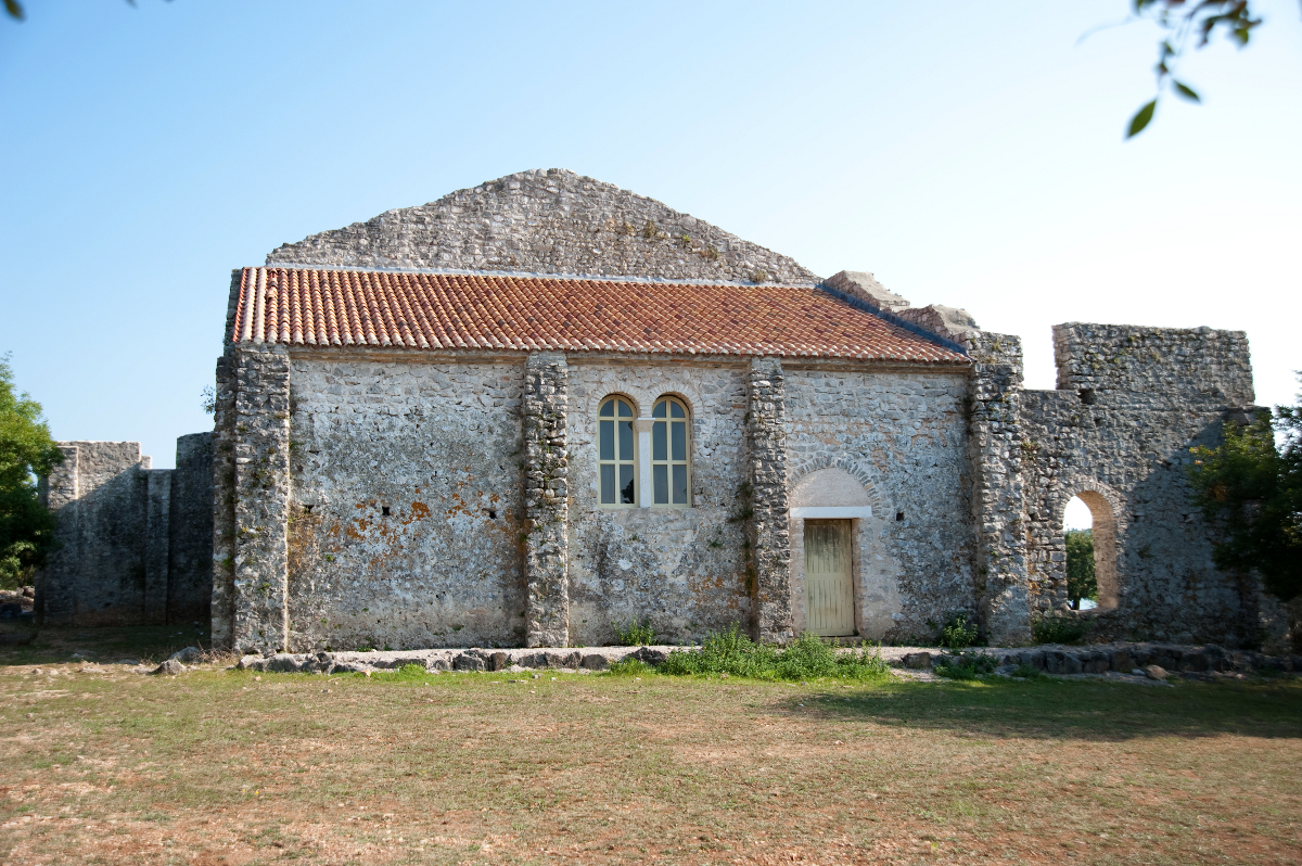 Ranokršćanski kompleks na lokalitetu Mirine u uvali Sepen blizu Omišlja